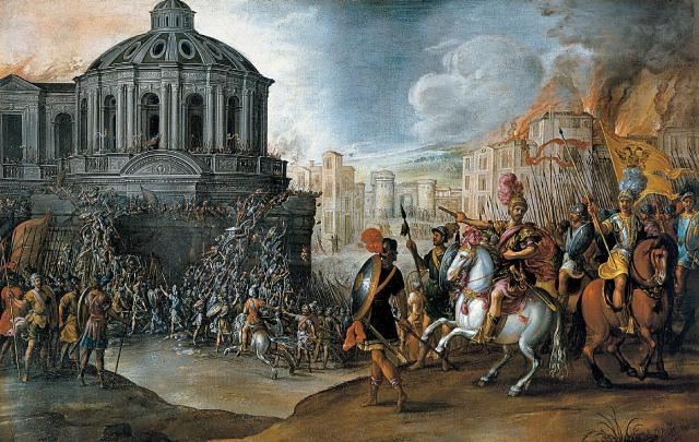 Tra gli avvenimenti bellici legati alla prima fase della guerra tra Carlo V e Francesco I riveste un significato particolare, per l’enorme impressione che suscitò, il saccheggio di Roma.